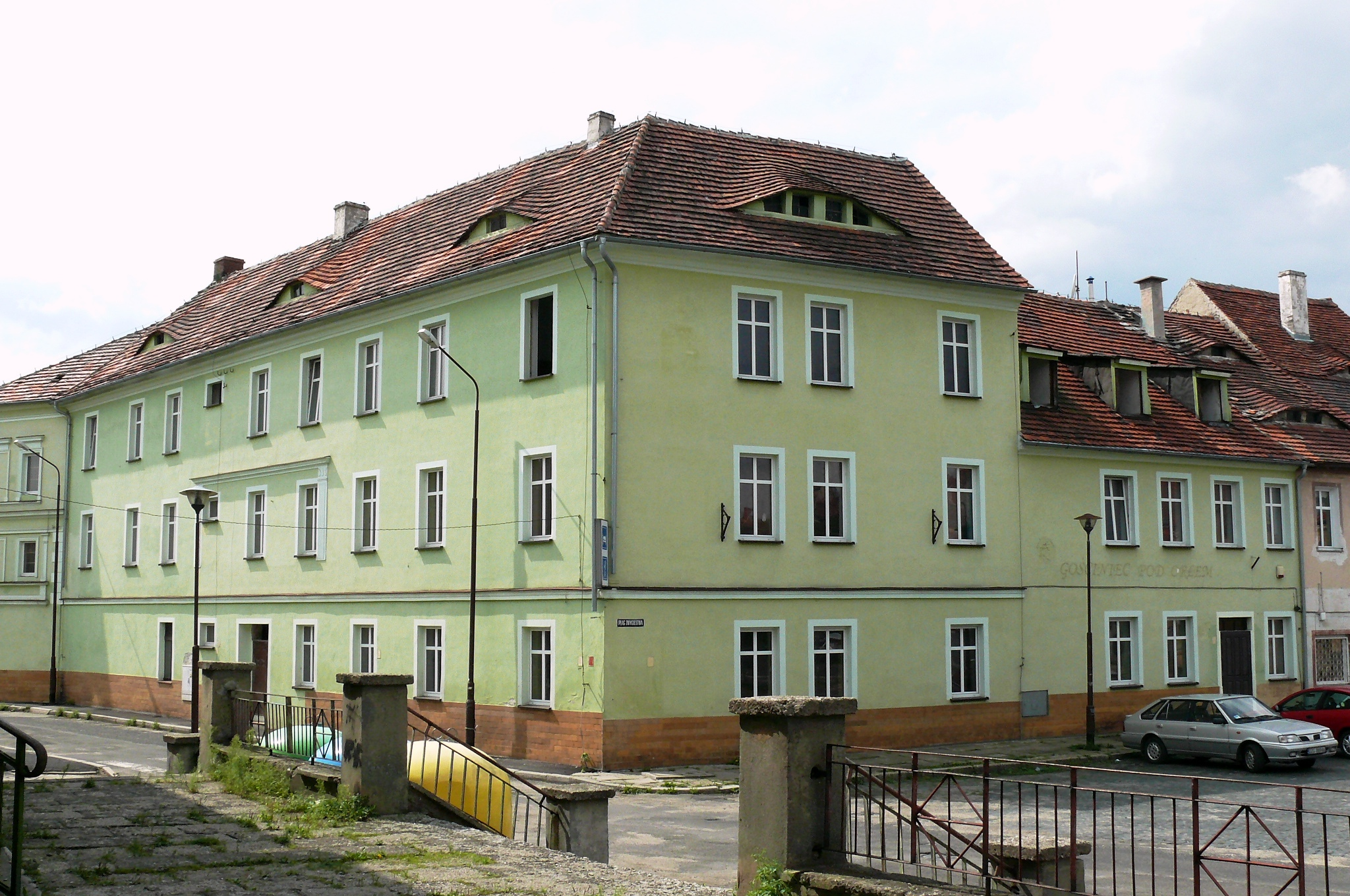 Hotel z gospodą Zawidów, pl. Zwycięstwa 16/17, Zawidów 12.1995.